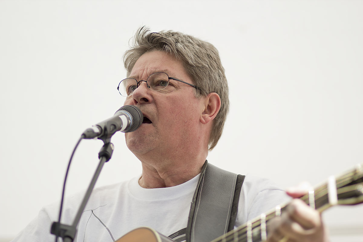 Visesangeren Erik Grip ved en koncert i Albertslund, 5. juni 2013